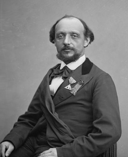 Jules Bergeret